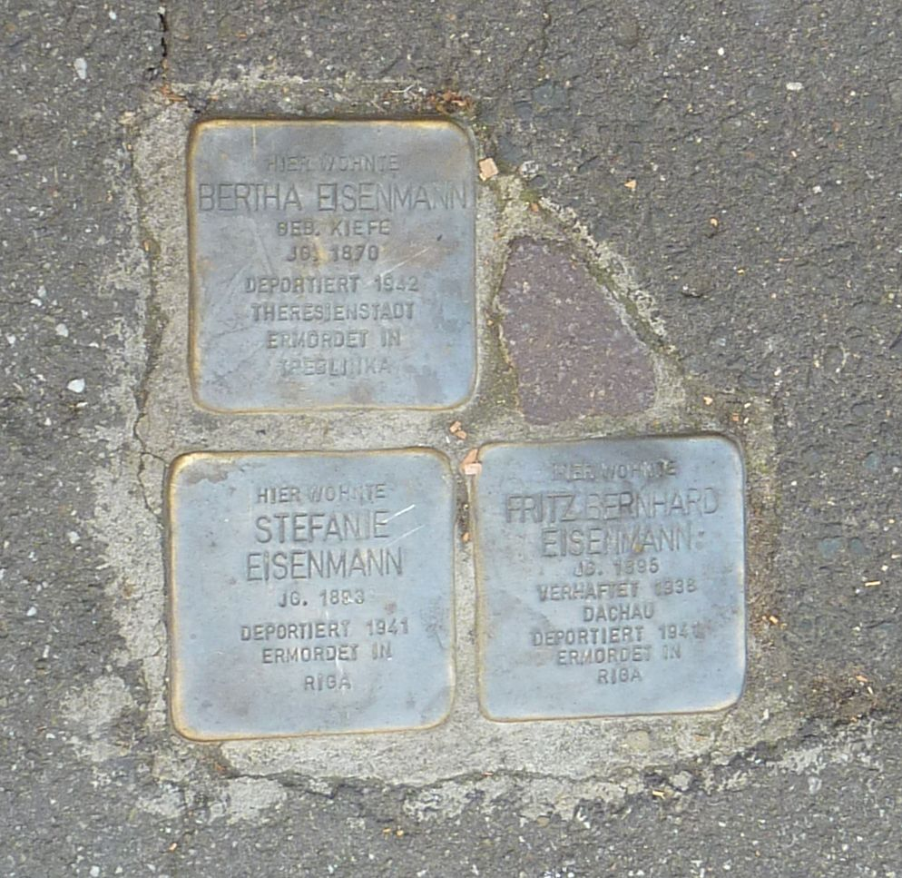 Stolpersteine für die Familie Eisenmann, Heilbronn, Mönchseestr. 82